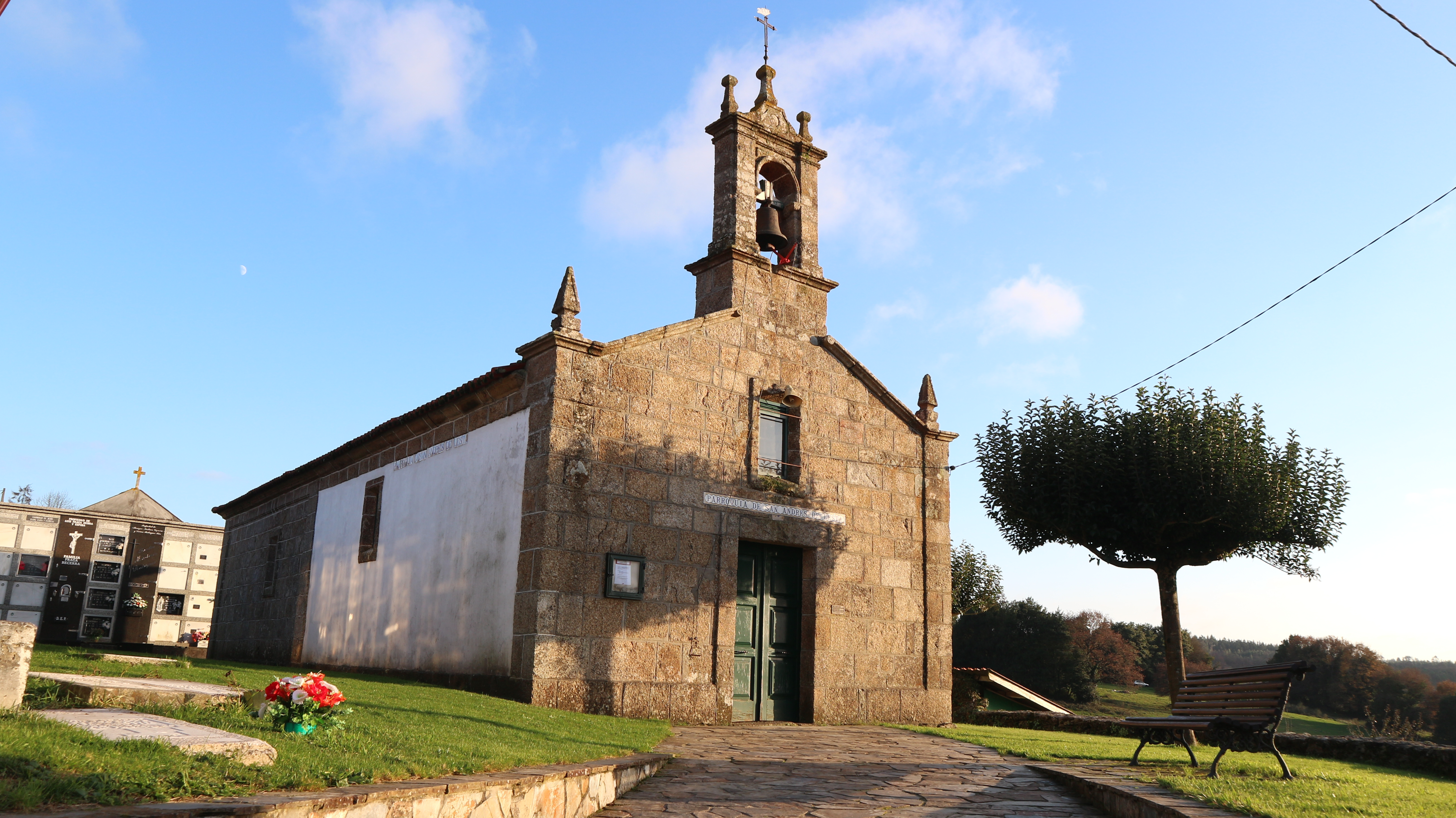 Igrexa de Santo André de Lesta. A Igrexa, Lesta, Ordes.